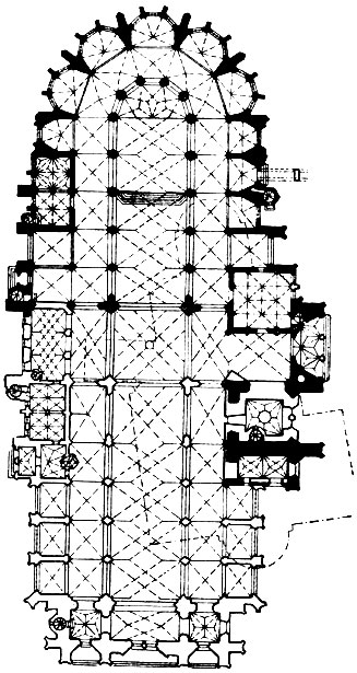 Собор св. Вита в Праге. Начат в 1344 г.; основное строительство во 2-й половине 14 в., западная часть собора - 2-я половина 19 - начало 20 в. План.